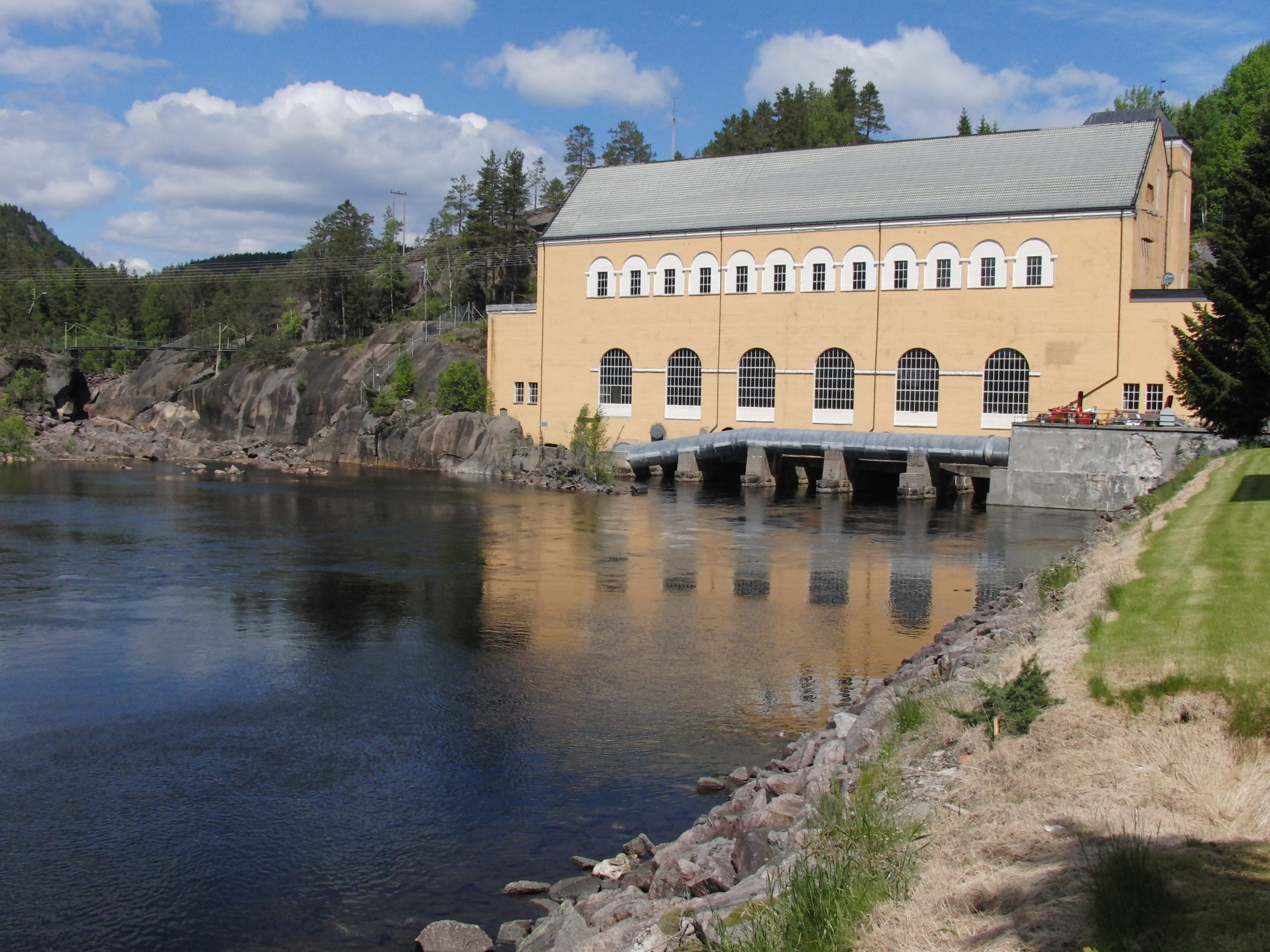 Høgefoss gamle kraftstasjon